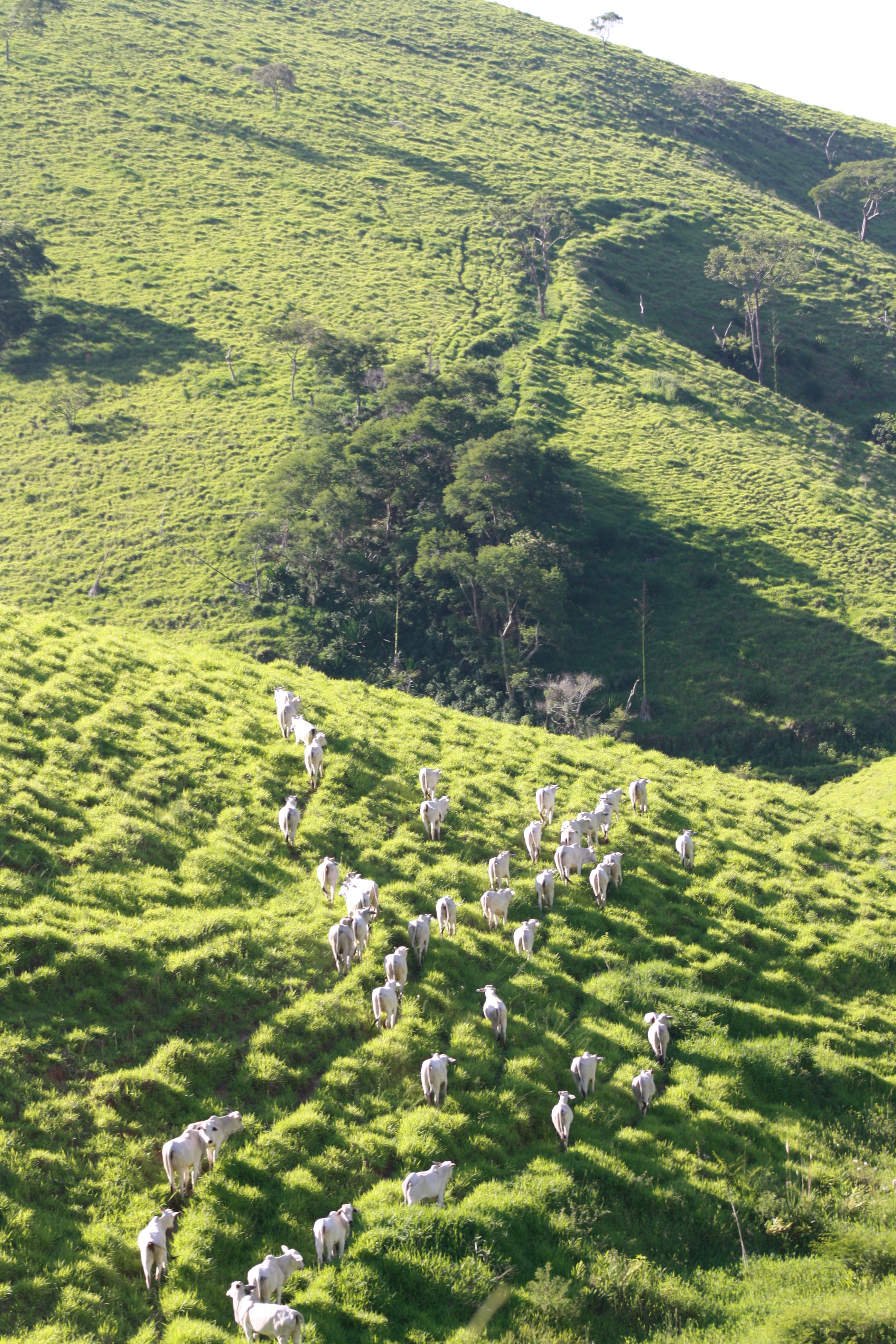 Passeio da Boiada no fim de tarde.